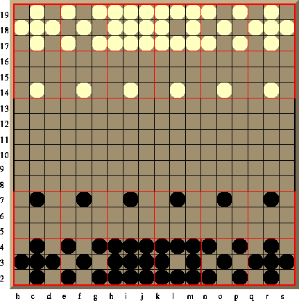 Die Grundstellung bei Gach. Rot umrandet, die nicht zwingend vorgeschrieben, Schuhe (Spielfigur-Quadrate) der Grundfiguren.